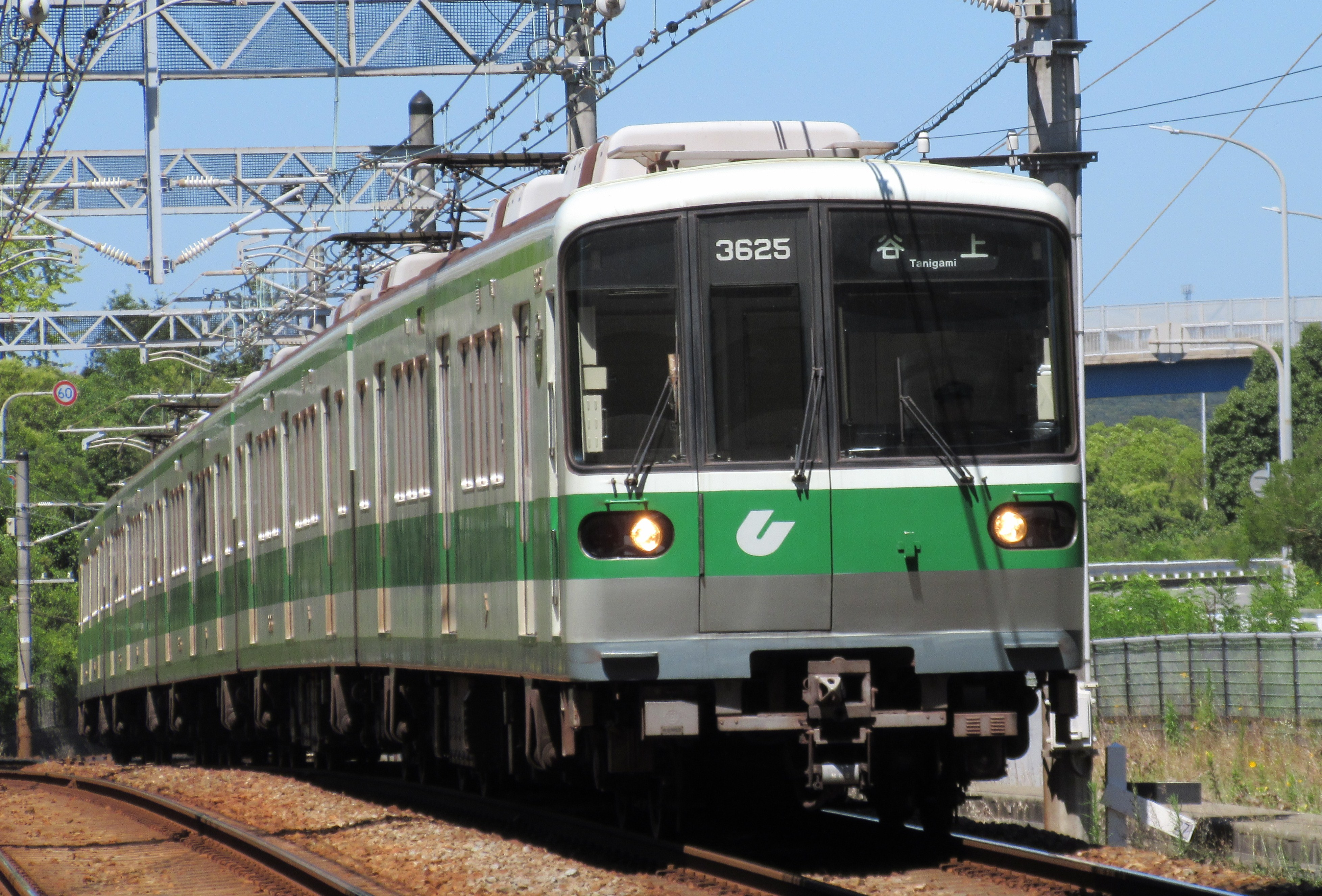 神戸市営地下鉄3625編成(学園都市駅にて)